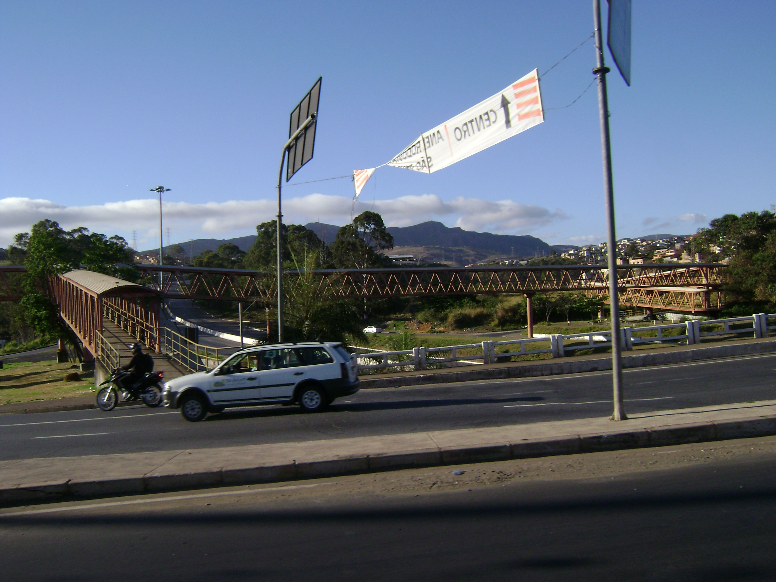 Viaduto da Avenida Waldir Soeiro Emrich sobre o Anel Rodoviário, em Belo Horizonte.